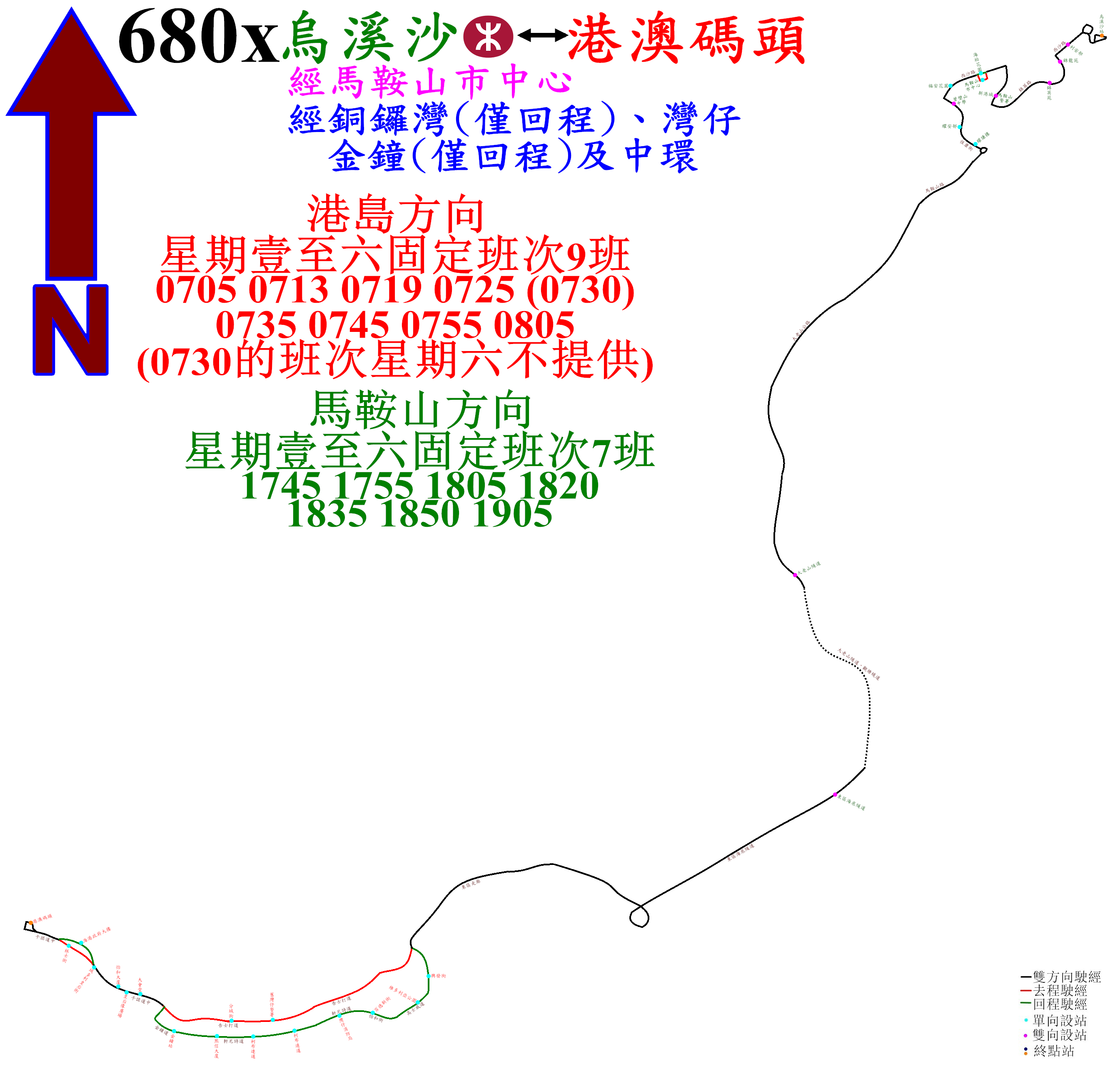 中文（香港）: 過海隧巴680X線的走線圖